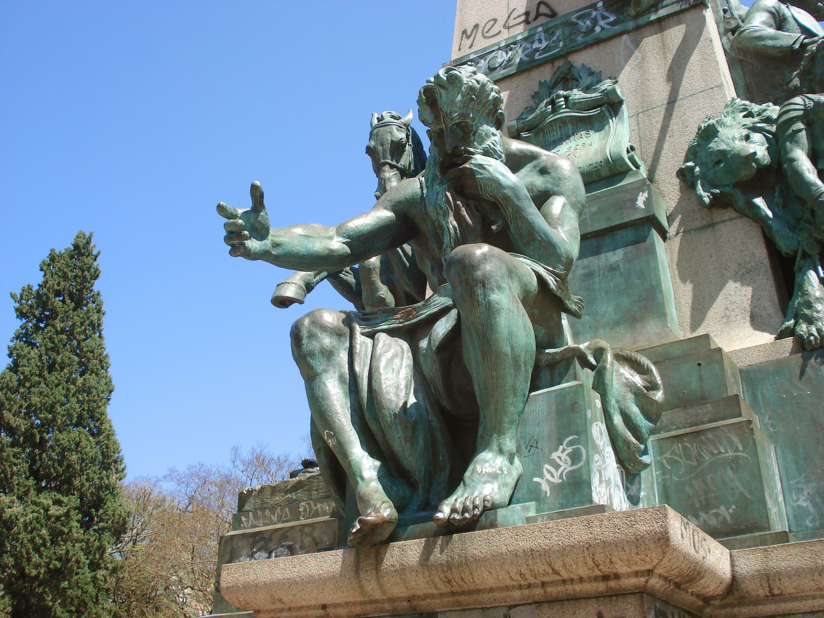 detalhe do monumento a Júlio de Castilhos, Praça da Matriz, Porto Alegre, Brasil. A figura do velho representa simbolicamente Júlio de Castilhos após seu mandato no governo do estado